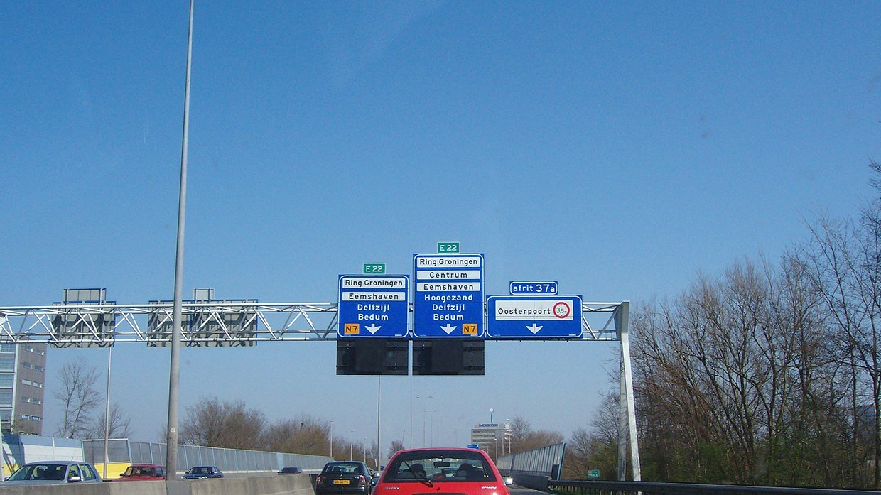 N7 / E22 bij Groningen, Ring Zuid